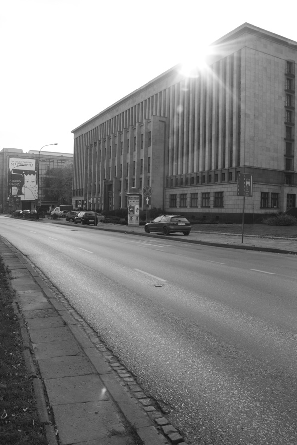 budynek Biblioteki Jagiellońskiej w Krakowie, arch: Wacław Krzyżanowski, 1928-39